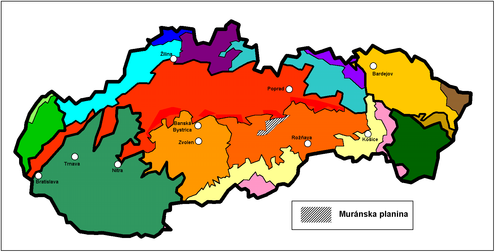 Muranska planina